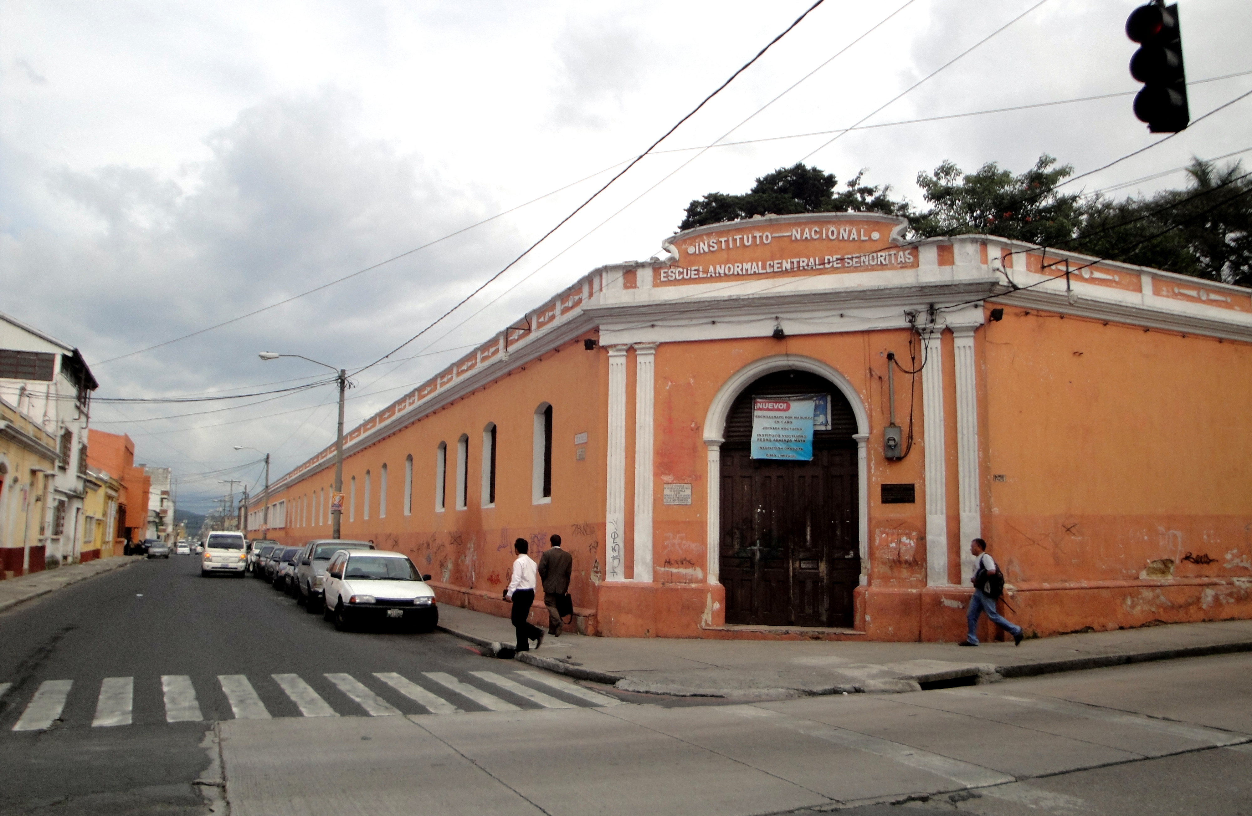 Edificio del Instituto de Señoritas Belén